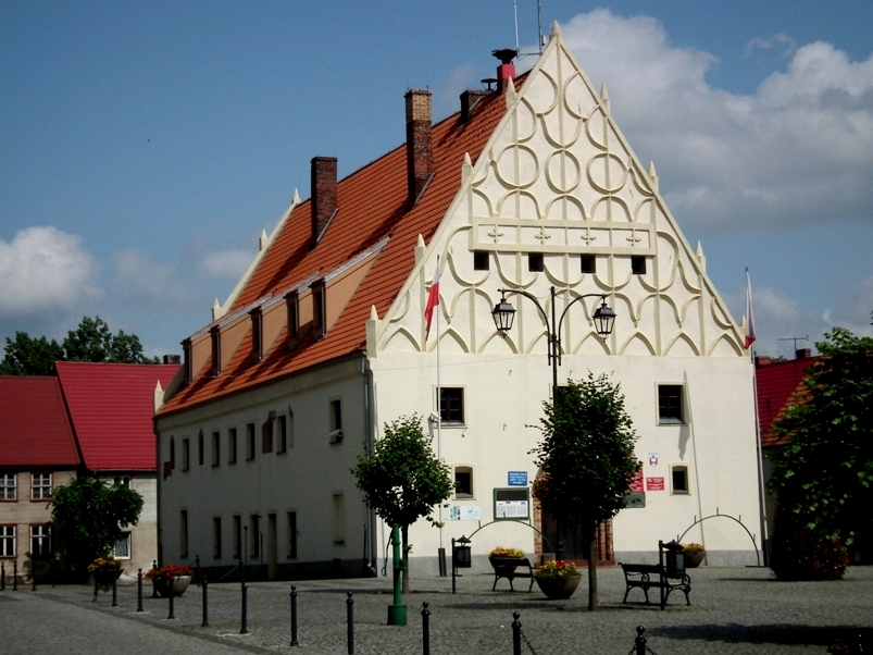 ratusz w Trzcińsku Zdroju